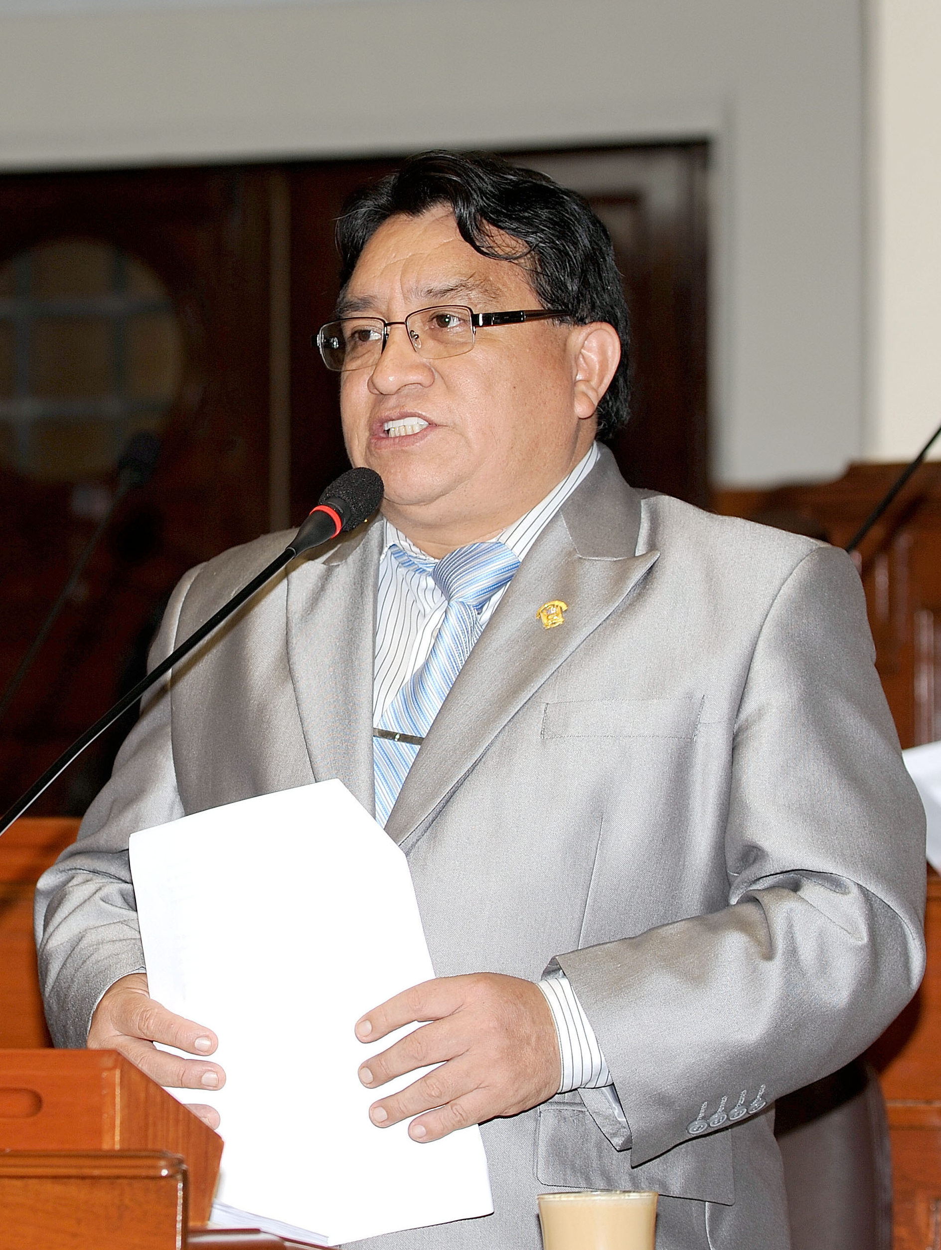 El legislador José Luna expresa su posición en el debate parlamentario realizado esta mañana por el Pleno congresal.